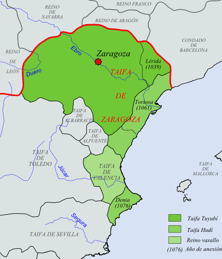 Expansión de la Taifa de Zaragoza (s.XI)